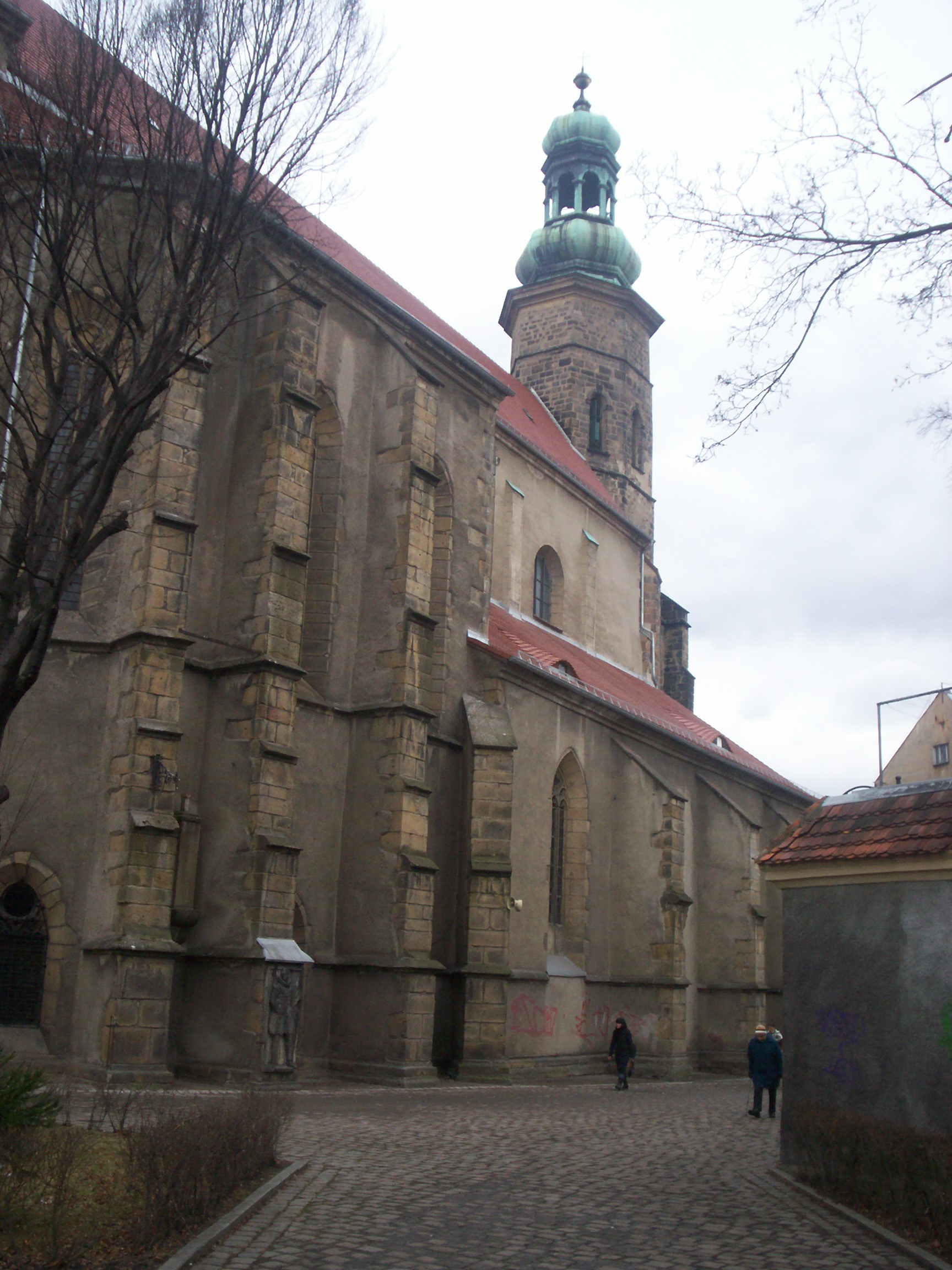 Jelenia Góra - kościół pod wezwaniem „Świętych Erazma i Pankracego”.